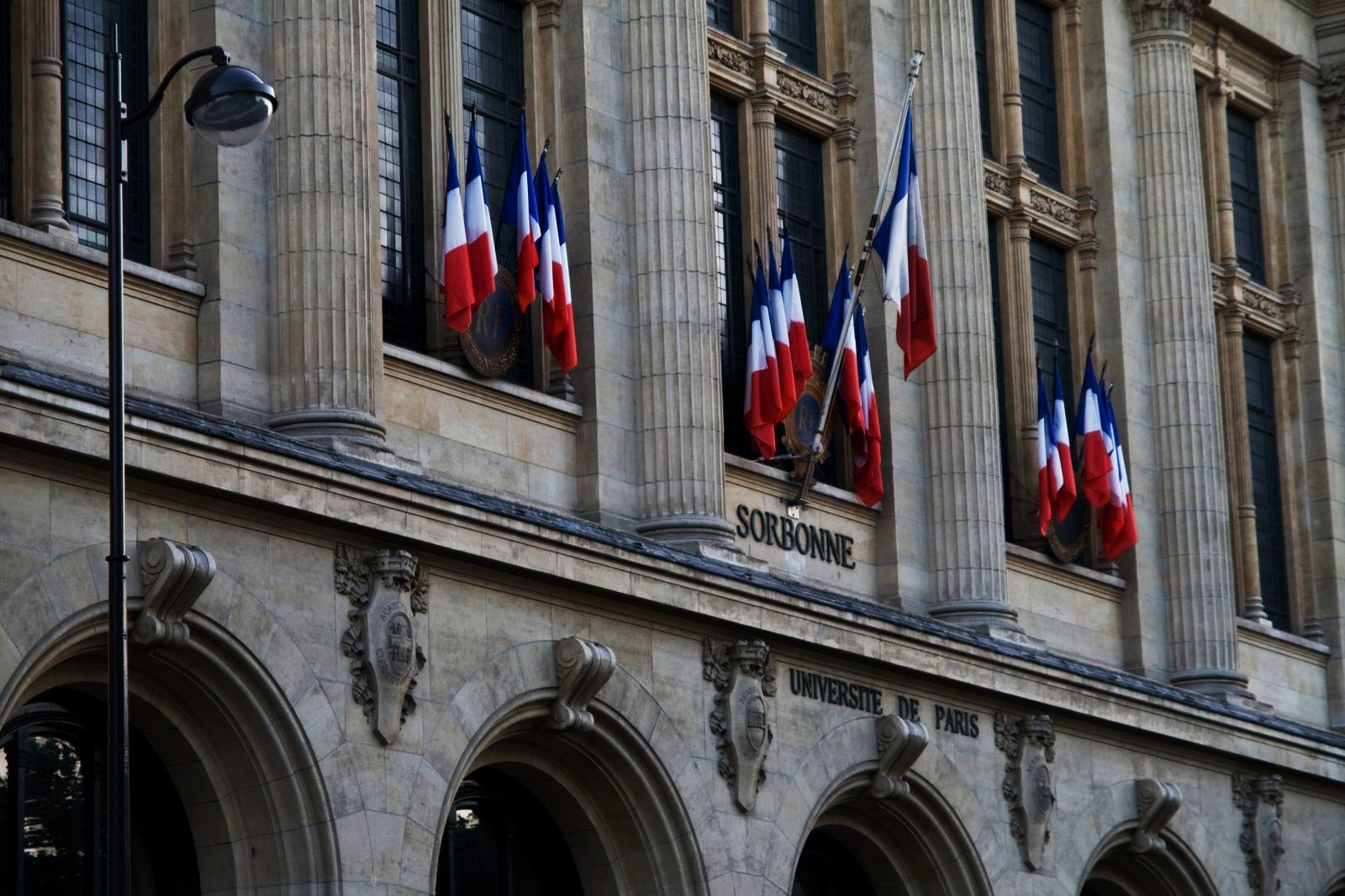 Sorbona